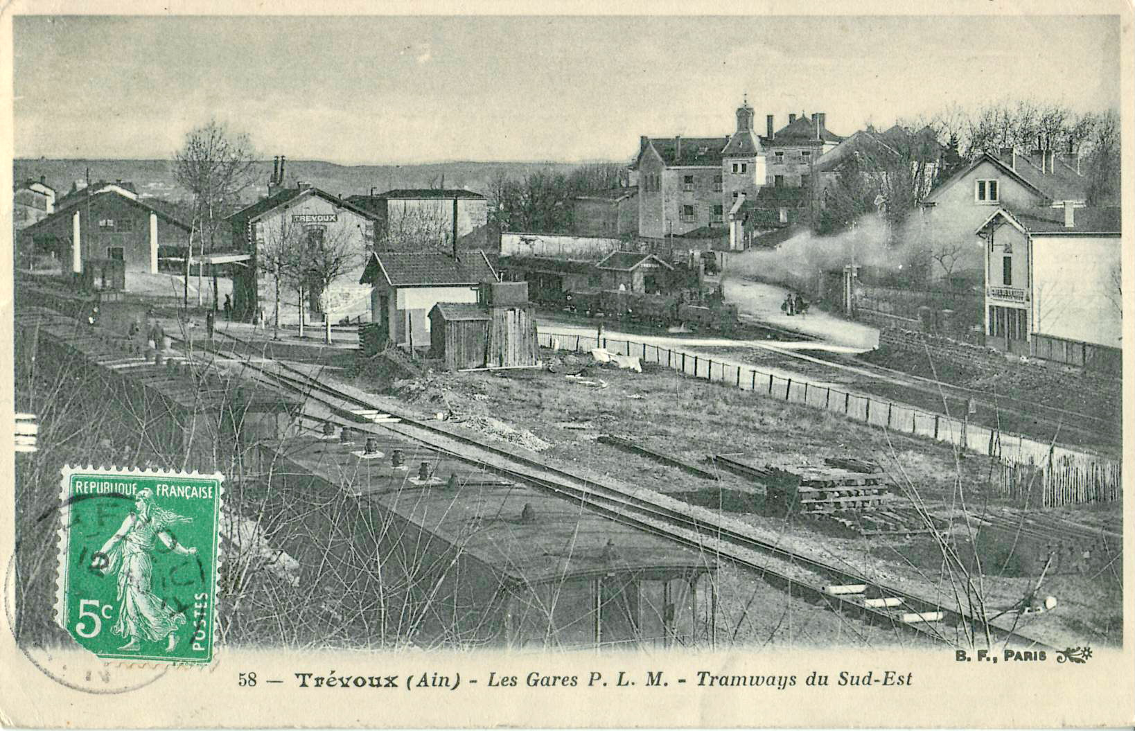 Carte postale ancienne éditée par BF à Paris, n°58 : TRÉVOUX - Les gares PLM - Tramway du Sud-Est